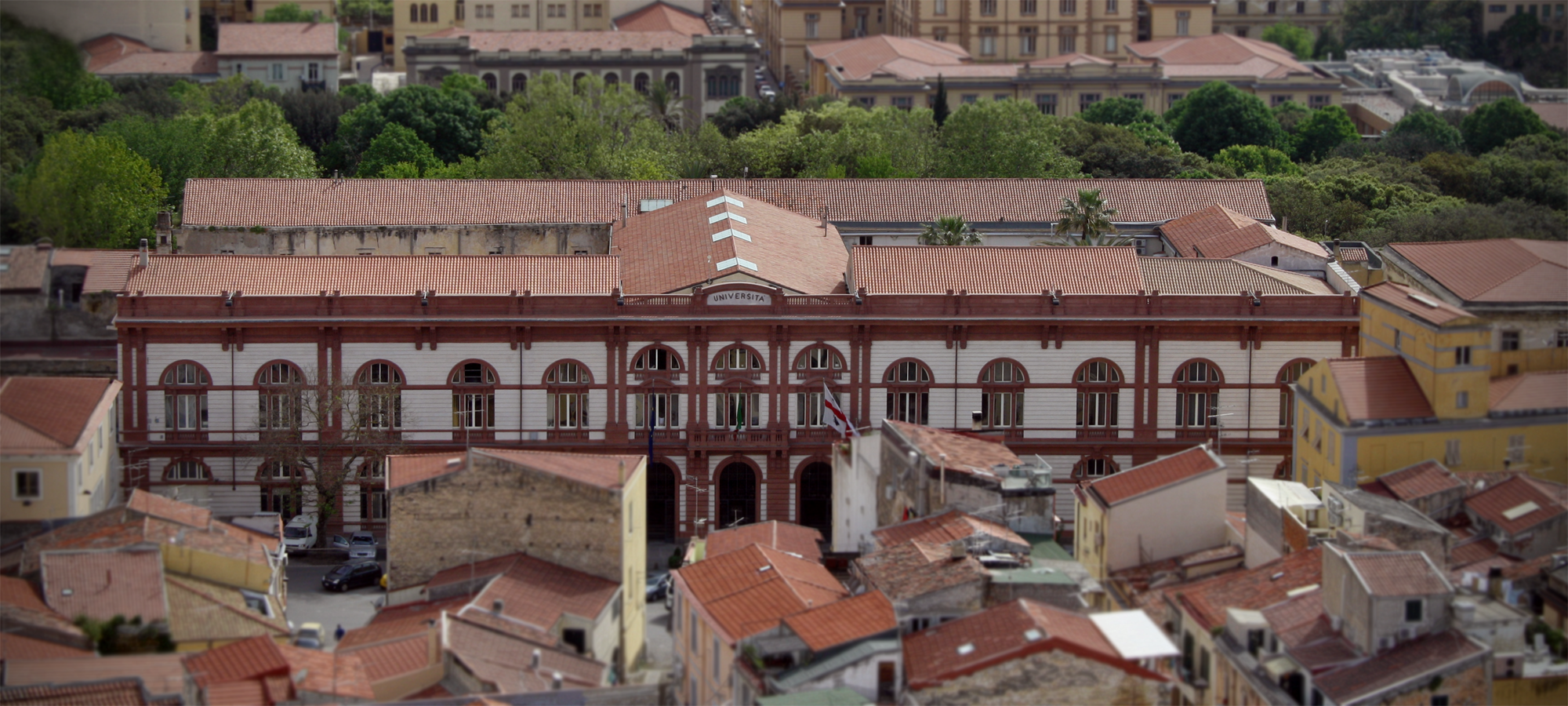 Sede centrale dell' Università di Sassari Main Building, University of Sassari